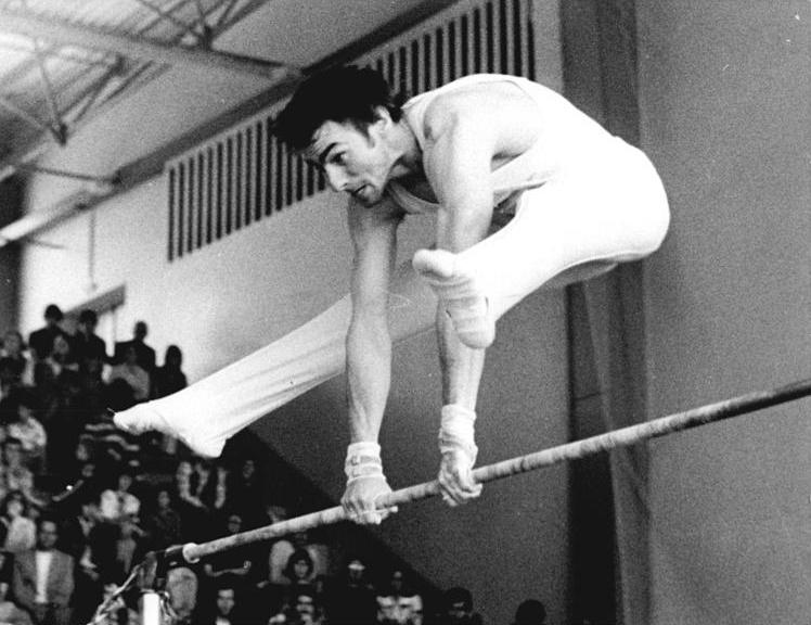 Roland Brückner ADN-ZB Liebers-24.6.78 Jena: Bei den DDR-Turnmeisterschaften der Herren in Jena-Neulobeda konnte Roland Brückner vom SC Dynamo Berlin am 24.6.78 seinen im Vorjahr errungenen Mehrkampftitel erfolgreich verteidigen.